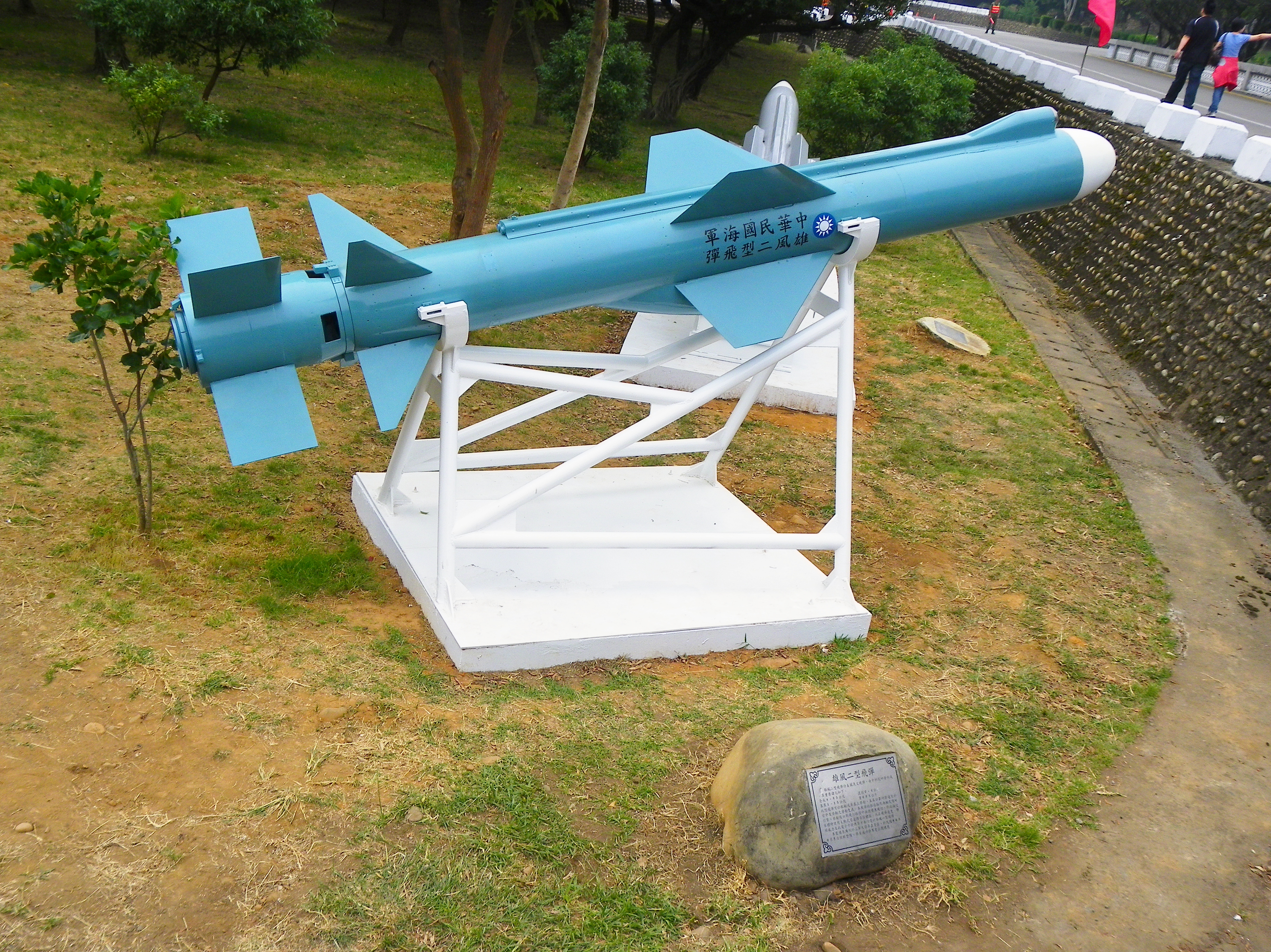 陳列於成功嶺的雄風二型反艦飛彈。